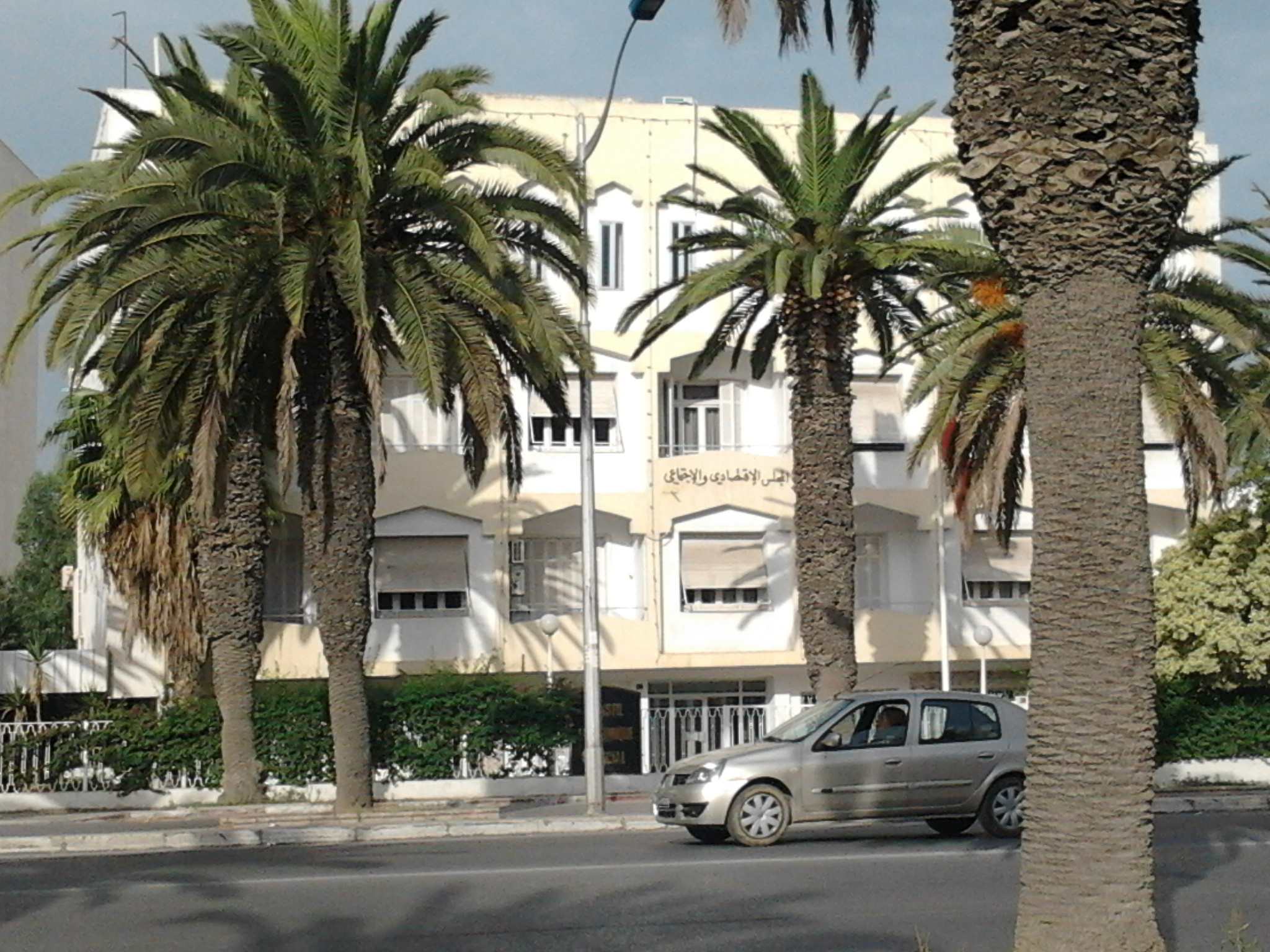 Conseil économique et social (siège provisoire de l'instance supérieure indépendante des élections)- Avenue Mohamed V - Tunis.